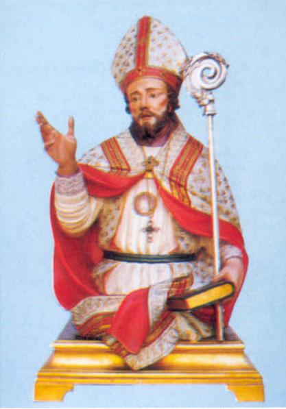 Borgosiepi, S. Adiutore Vescovo, Parrocchia di s. Adiutore-Concattedrale di Cava de' Tirreni, statua lignea secolo XVII circa.